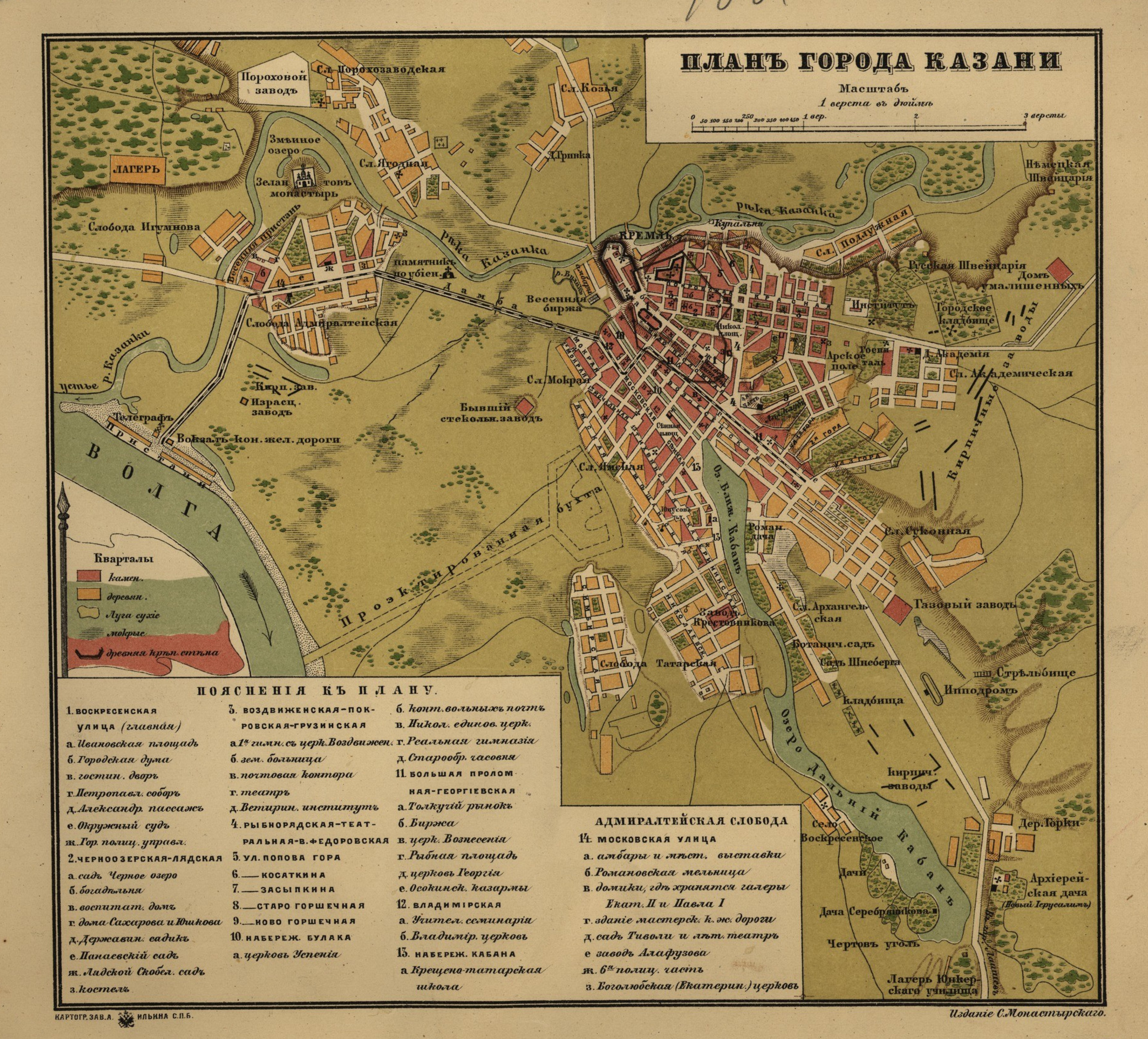 План Казани конца XIX века. Предположительно из книги: Монастырский С. Иллюстрированный спутник по Волге. — Казань: Типо-литография Ключникова, 1884. — 512 c.